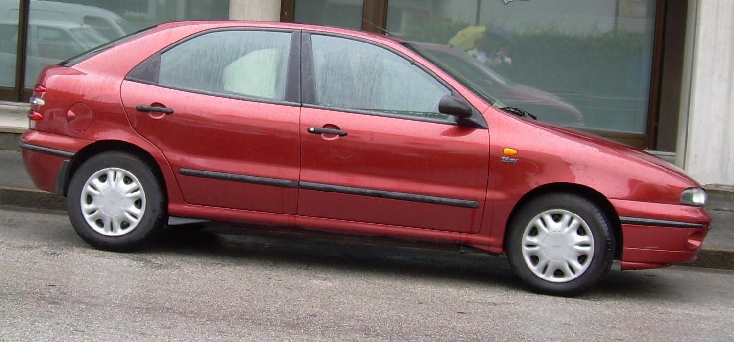 Autore:Forrer Licenza: Una Fiat Brava.